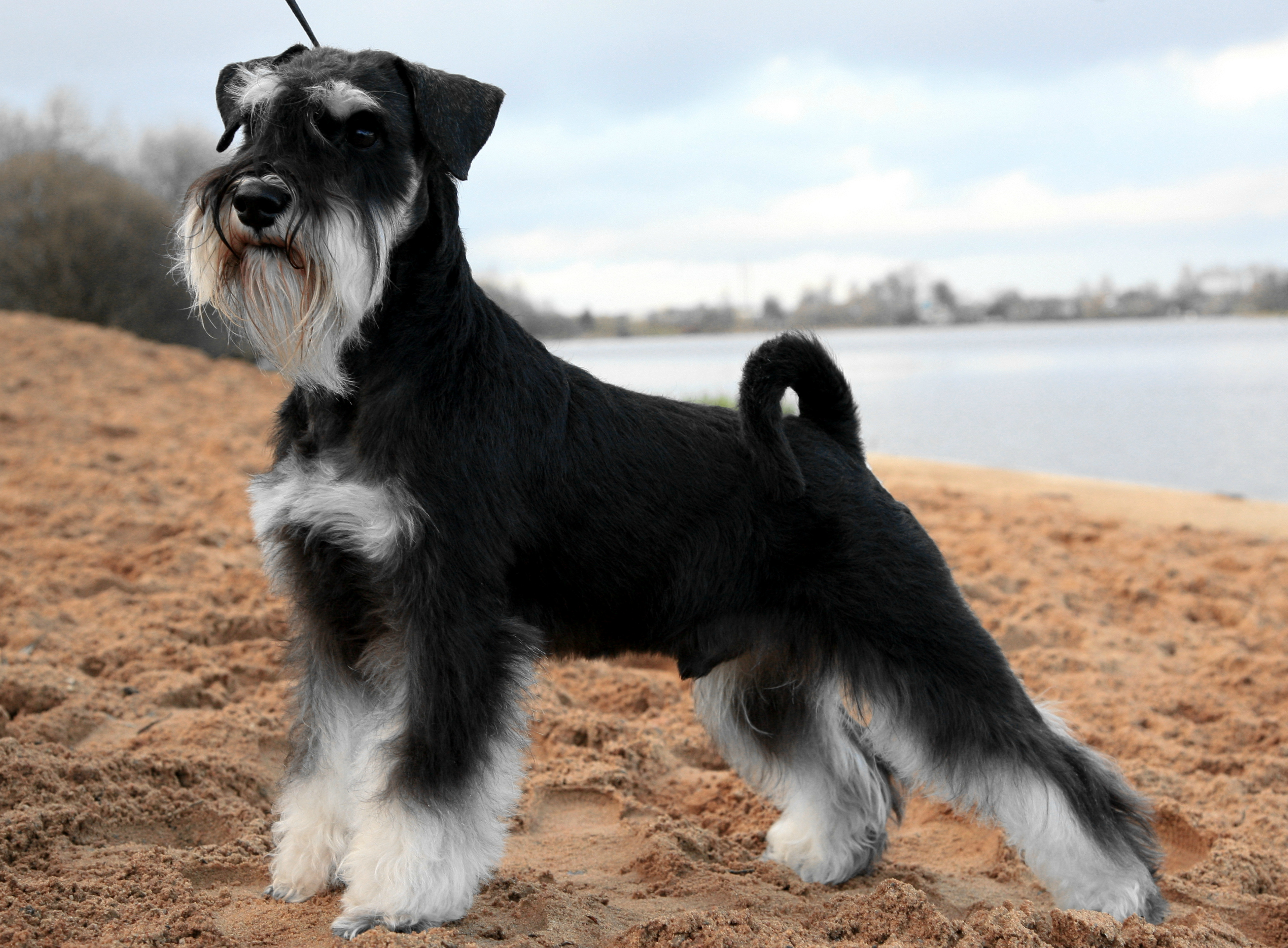 Питомник "Ассон Ари" Цвергшнауцеры белые и черные с серебром 12